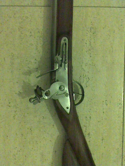 Rèplica d'un mosquet doglock anglès de l'any 1701. Detall del pany. Vegeu el dog (gos) a la part inferior